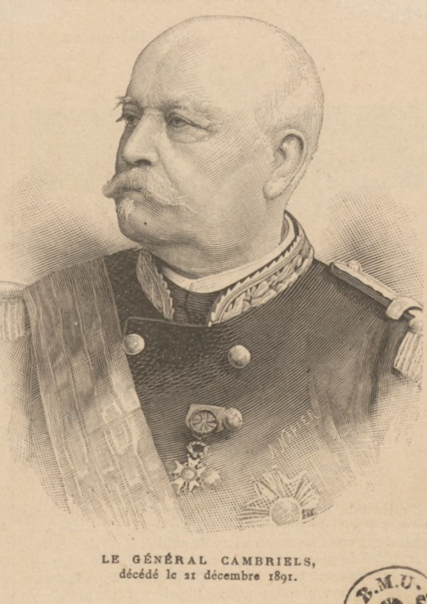 Lithograpie - Portrait des französischen Generals Hippolyte-Albert Cambriels